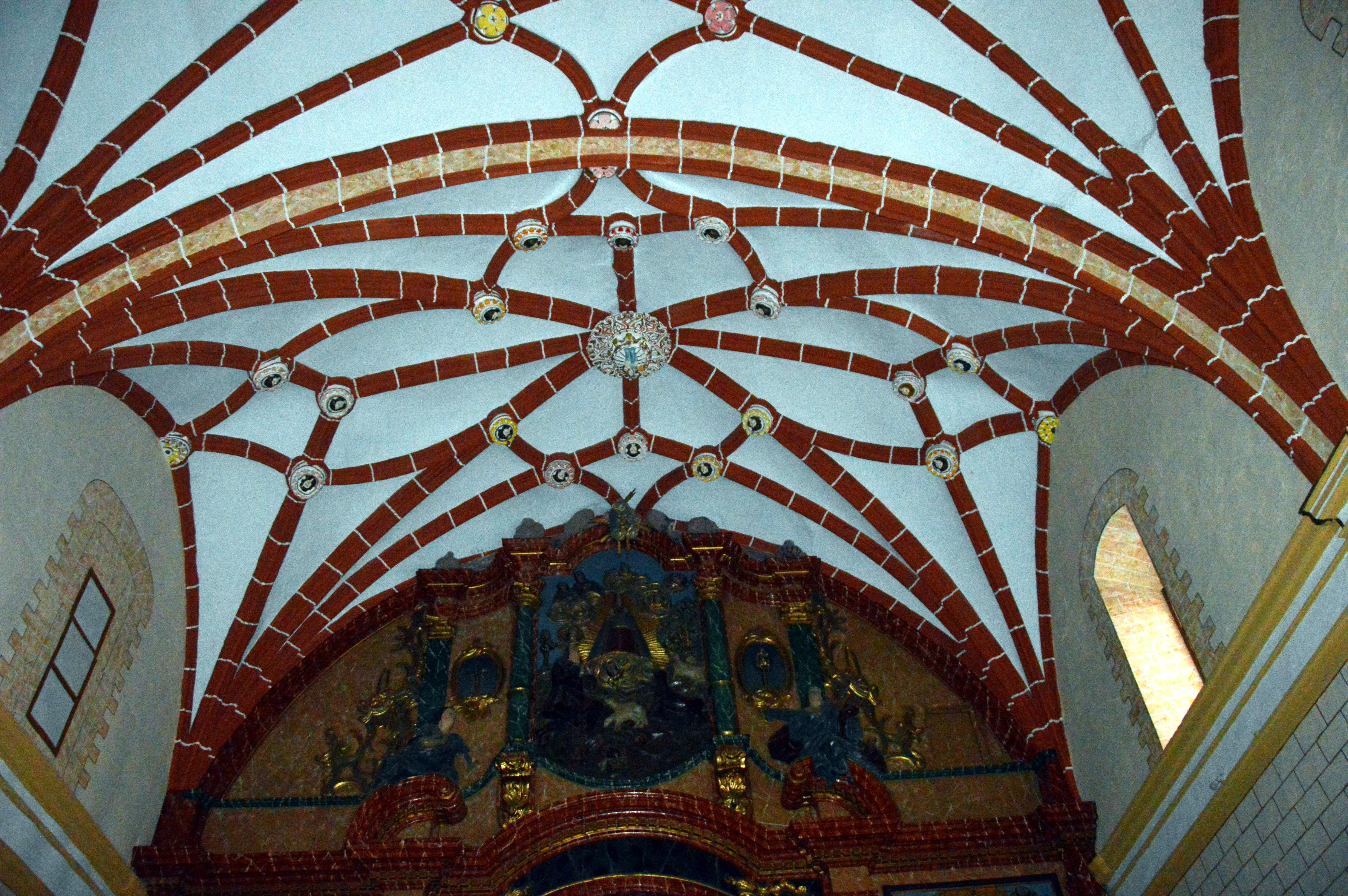 Detalle de la crucería estrellada de la bóveda del Santuario de la Fuensanta en Villel (Teruel), con el retablo barroco al fondo (2019).